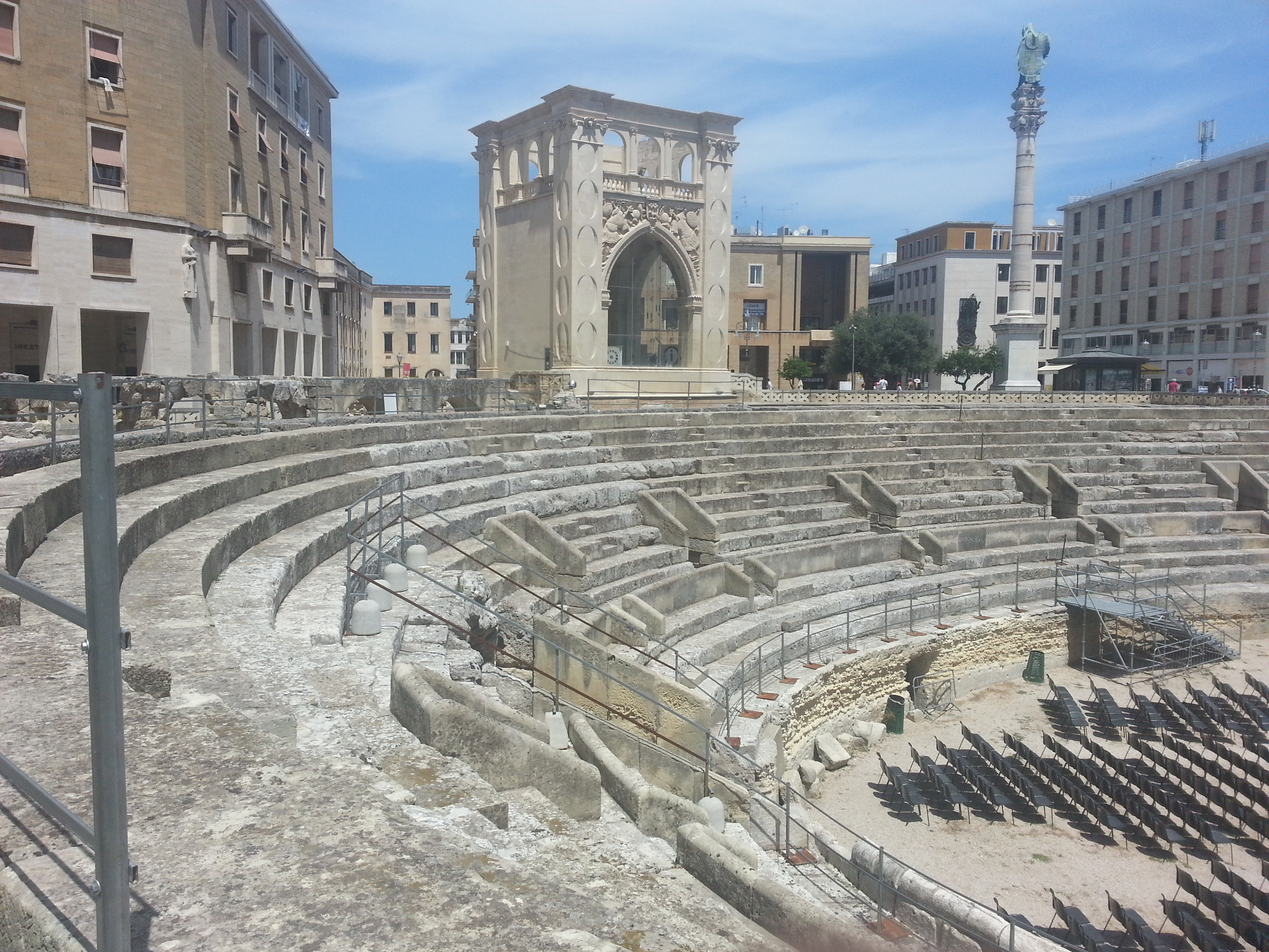 Anfiteatro Romano This is a photo of a monument which is part of cultural heritage of Italy.